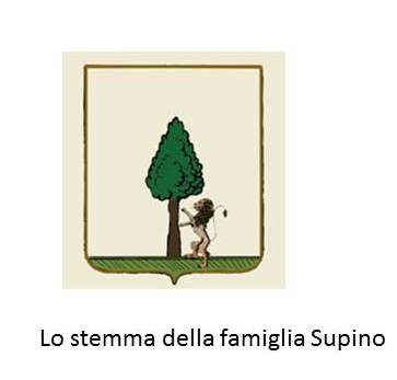 E' evidente un leone che poggia su un tronco di pino